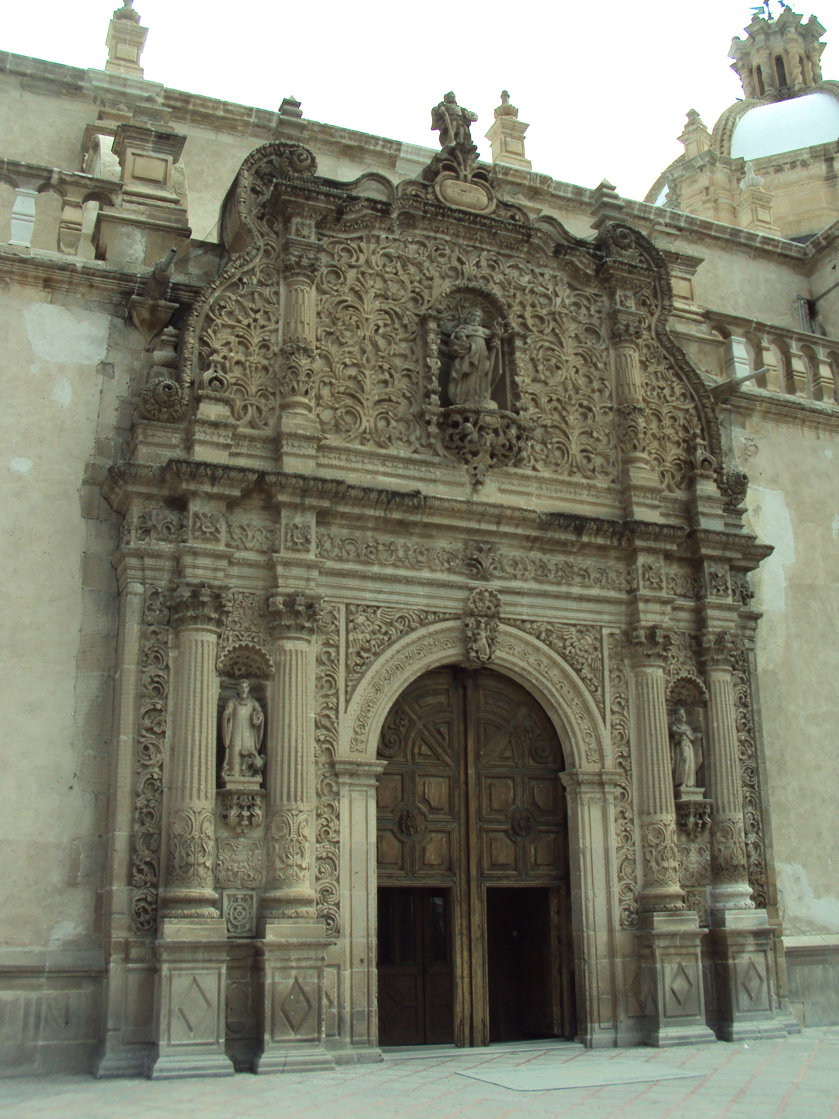 Portada norte de la Catedral de Chihuahua